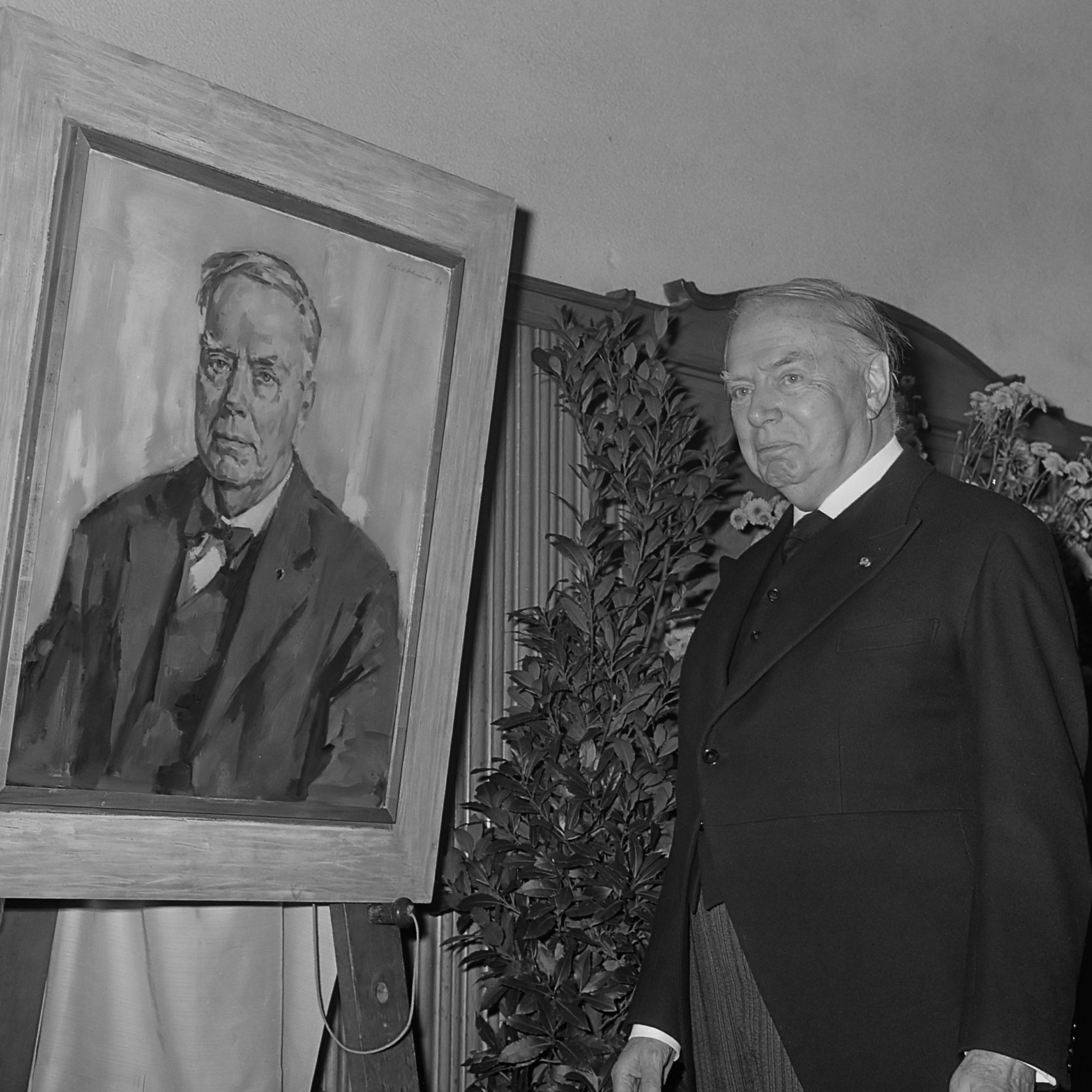 Vijf curatoren namen afscheid van de Hogeschool te Rotter mr. dr. Van der Mandele kreeg schilderij aangeboden Maasboulevard 9 november 1964